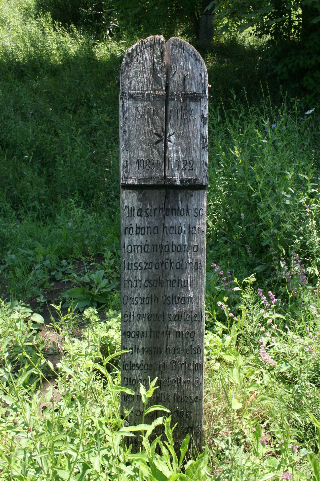 Szászcsávási fejfa (Erdély)